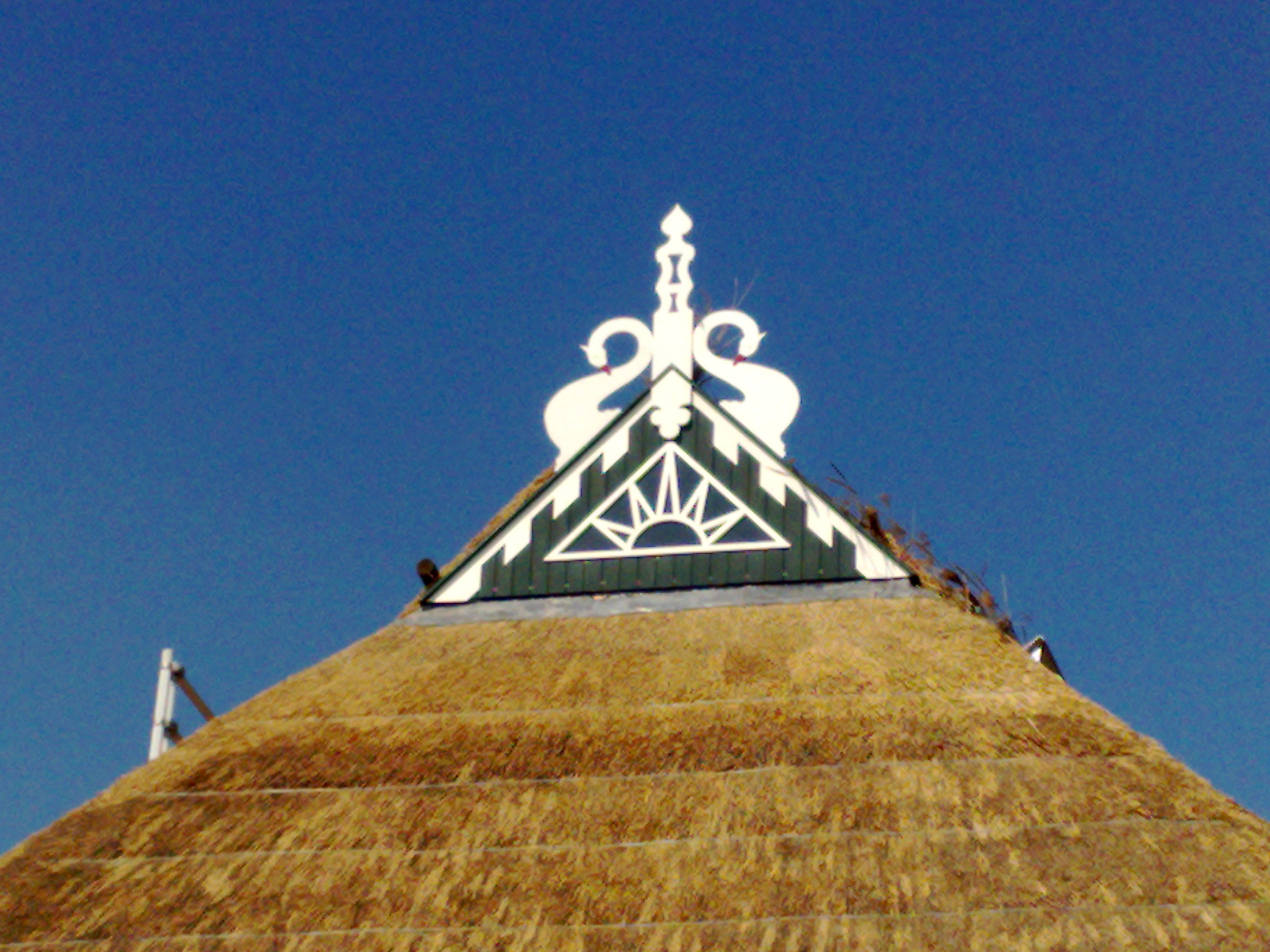 Volkunststof uilenbord van